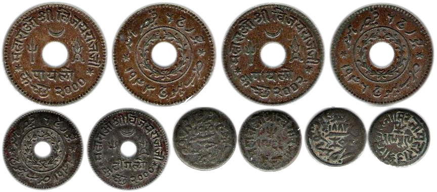 Monedas de Kutch. Línea superior: dos piezas de 1 adhio (o 1/2 kori) de 1943 y 1945. Anversos y reversos. Línea inferior, izquierda: un payalo (o 1/4 de kori) de 1943. Centro: trambiyo de 1909. Derecha: trambiyo de 1883.